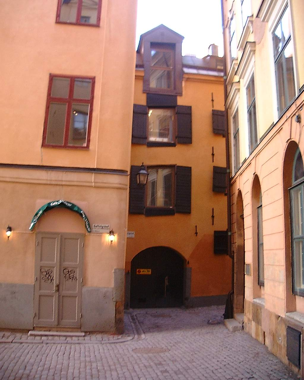 Eastern end of Pelikansgränd and western end of Gaffelgränd, Gamla stan, Stockholm.